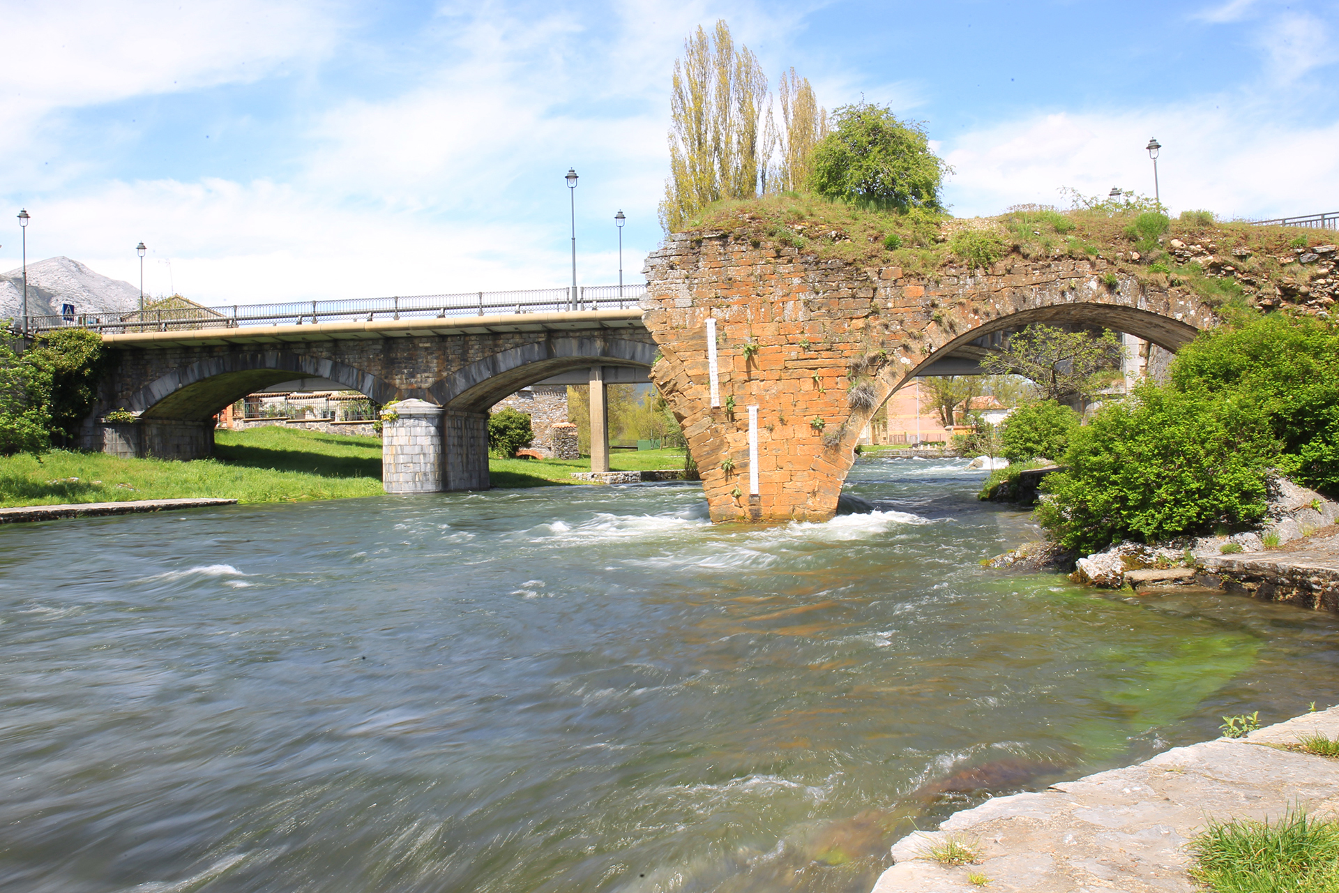 Riberas del río Carrión y afluentes This is a photography of a Site of Community Importance in Spain with the ID: ES4140011. Natura2000 entry, EEA entry